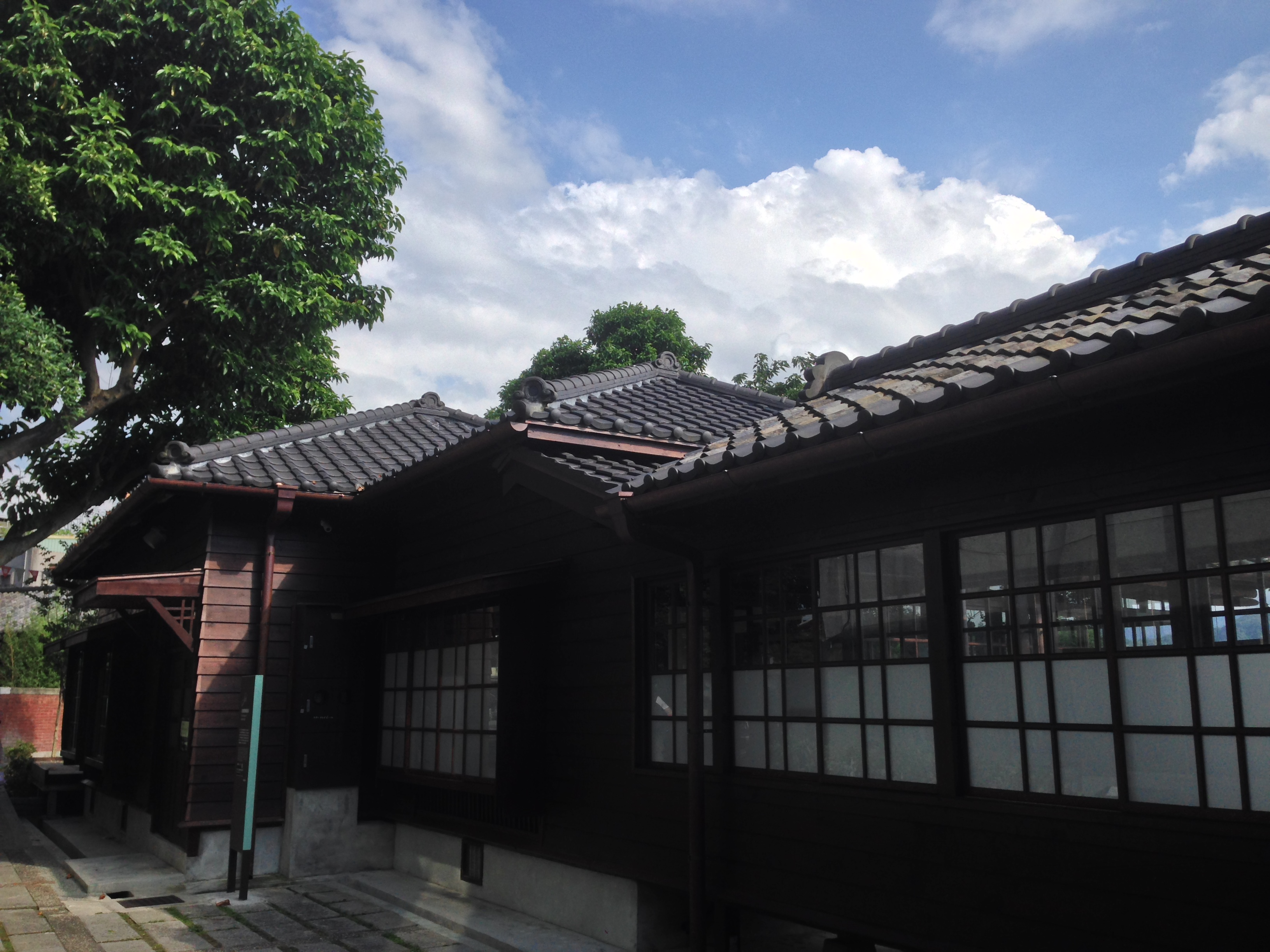 中文（台灣）: 桃園市立大溪木藝生態博物館武德殿附屬建築